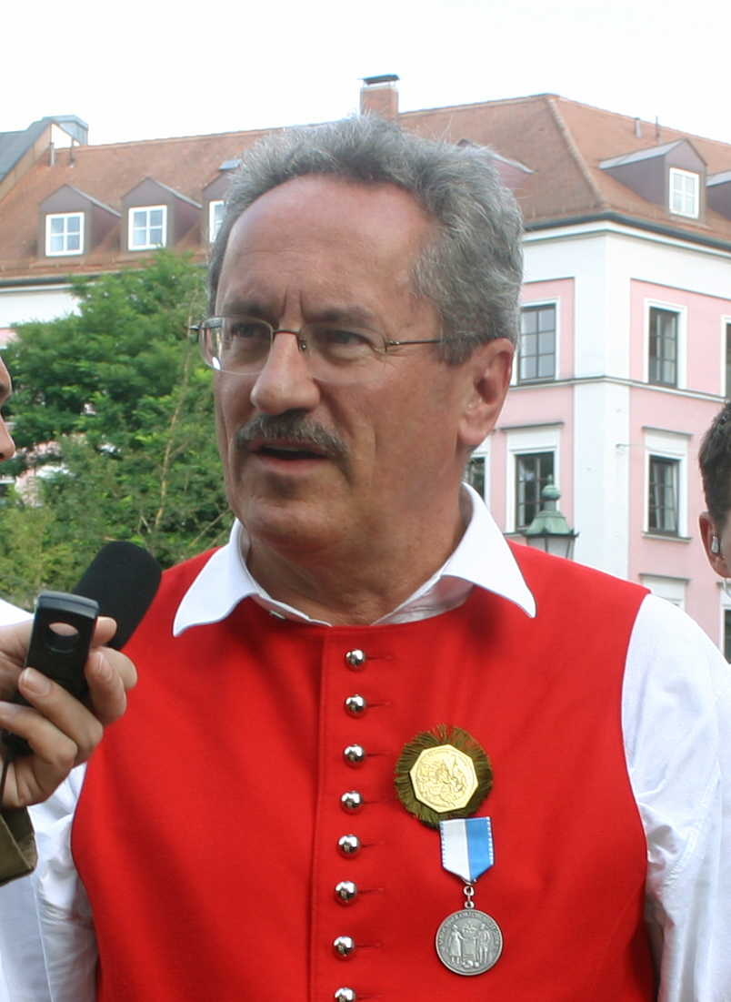 Christian Ude, deutscher Politiker (SPD), zur Zeit (Herbst 2006) Oberbürgermeister der Bayerischen Landeshauptstadt München.